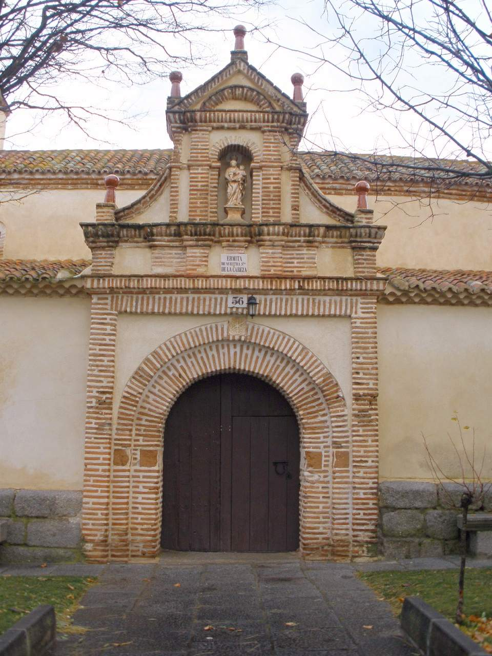 Avila - Ermita de Nuestra Señora de la Cabeza